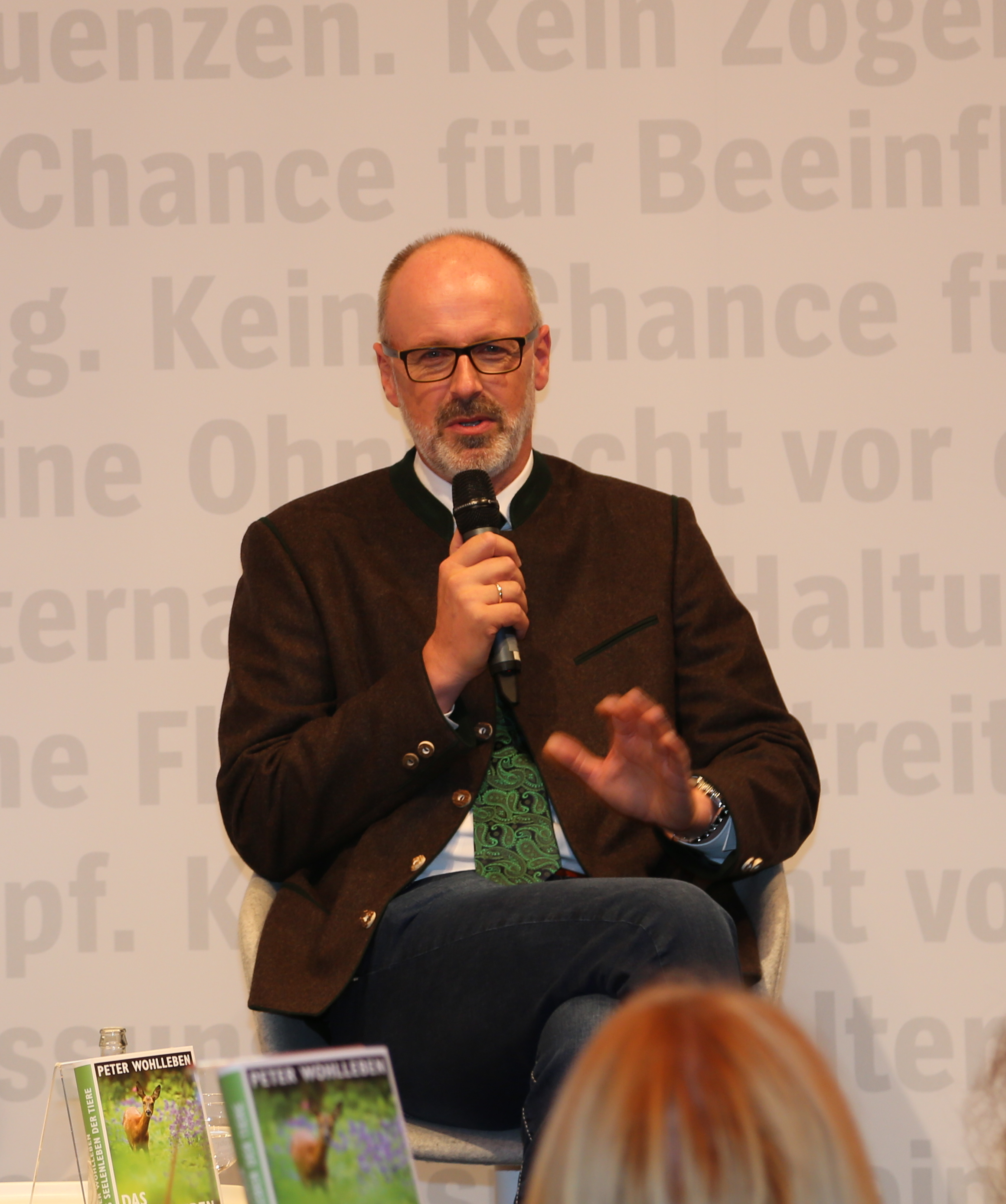 Peter Wohlleben bei der Frankfurter Buchmesse 2016